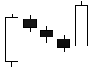 Analisi Tecnica, Candele giapponesi, Rising three methods